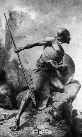 Pintura representando a Viriato, titulada Viriato, obra del pintor español Eugenio Oliva (1852-1925).